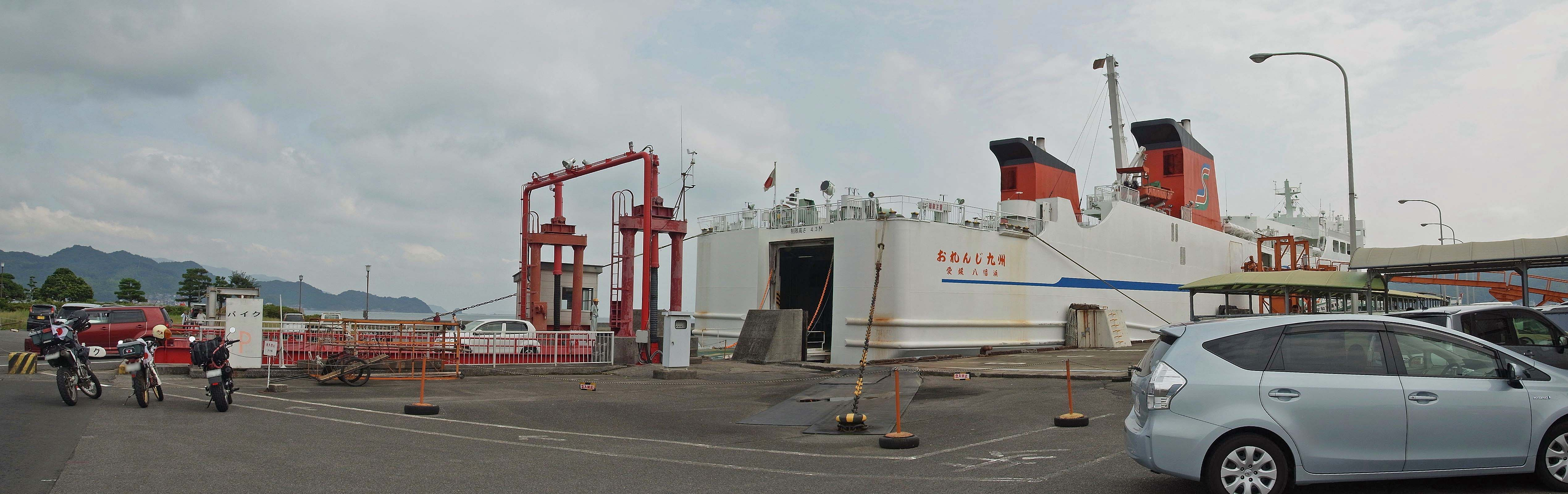 Usuki port Ferrie terminal , 臼杵港フェリーターミナル